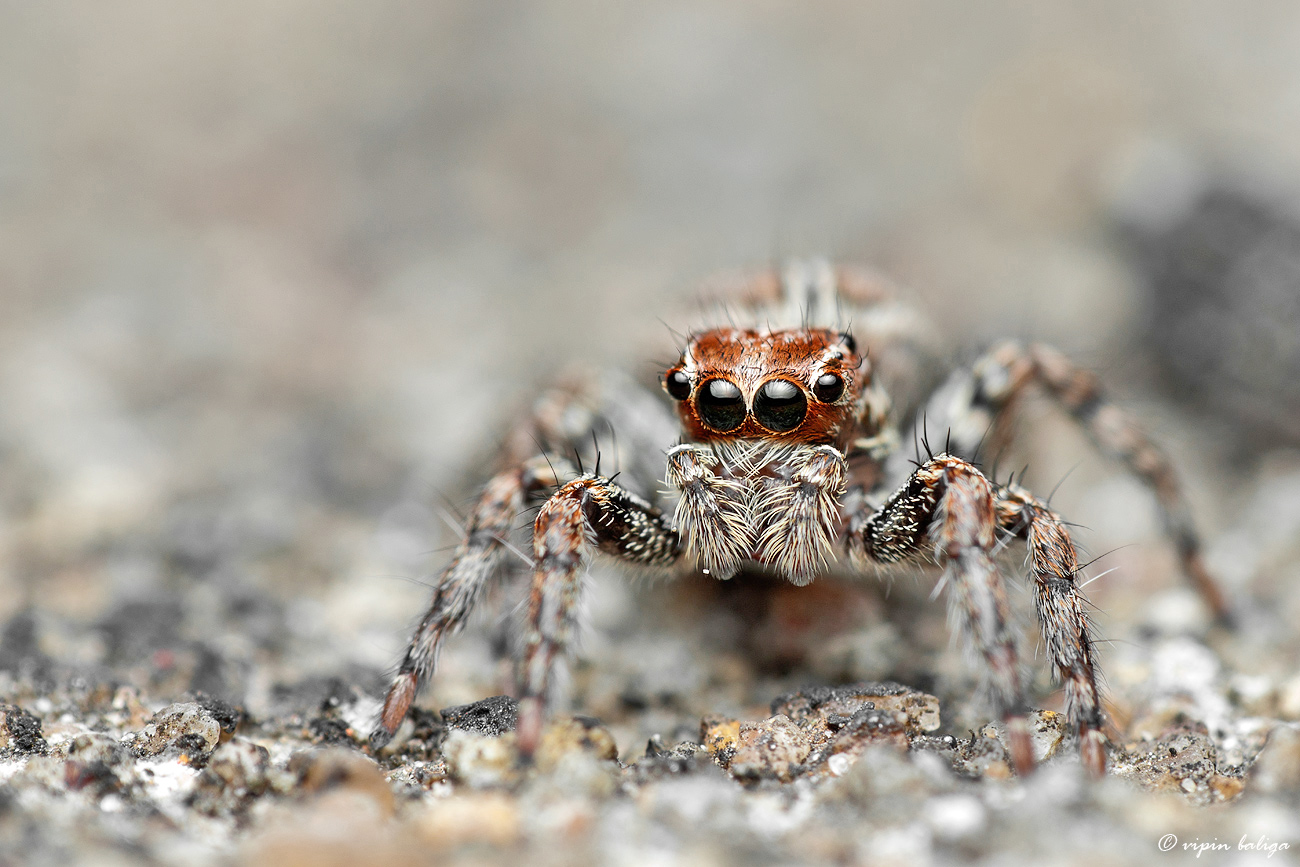 Plexippus paykulli female